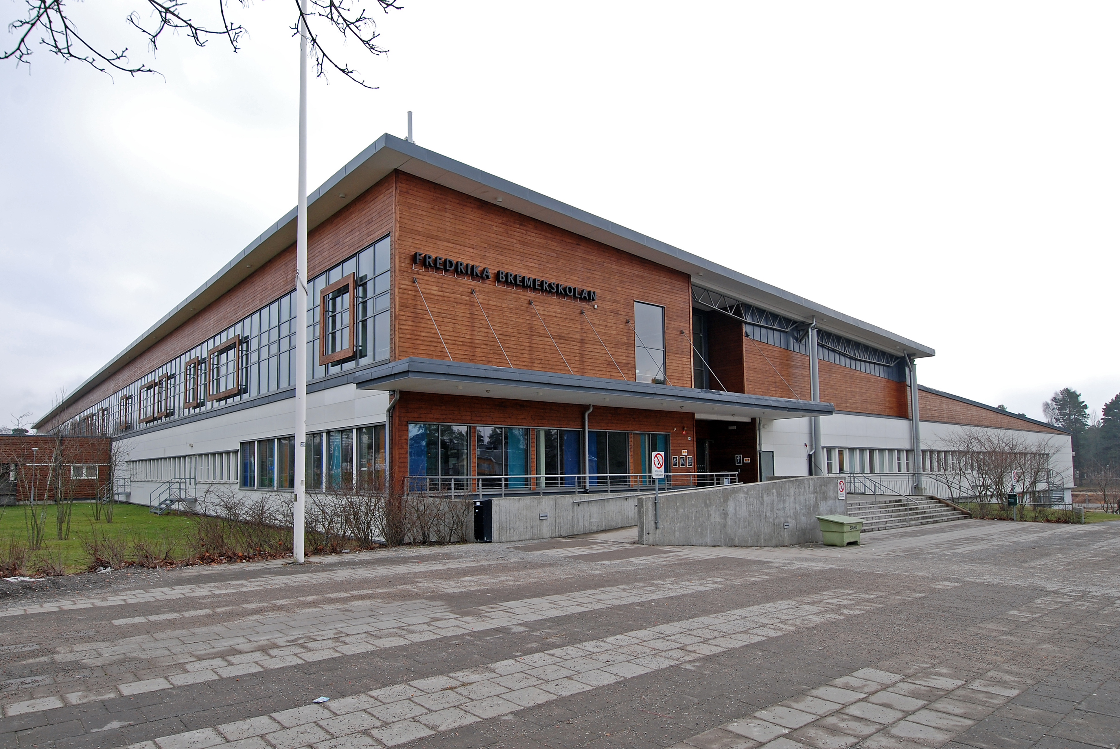 Fredrika Bremerskolan, Handen